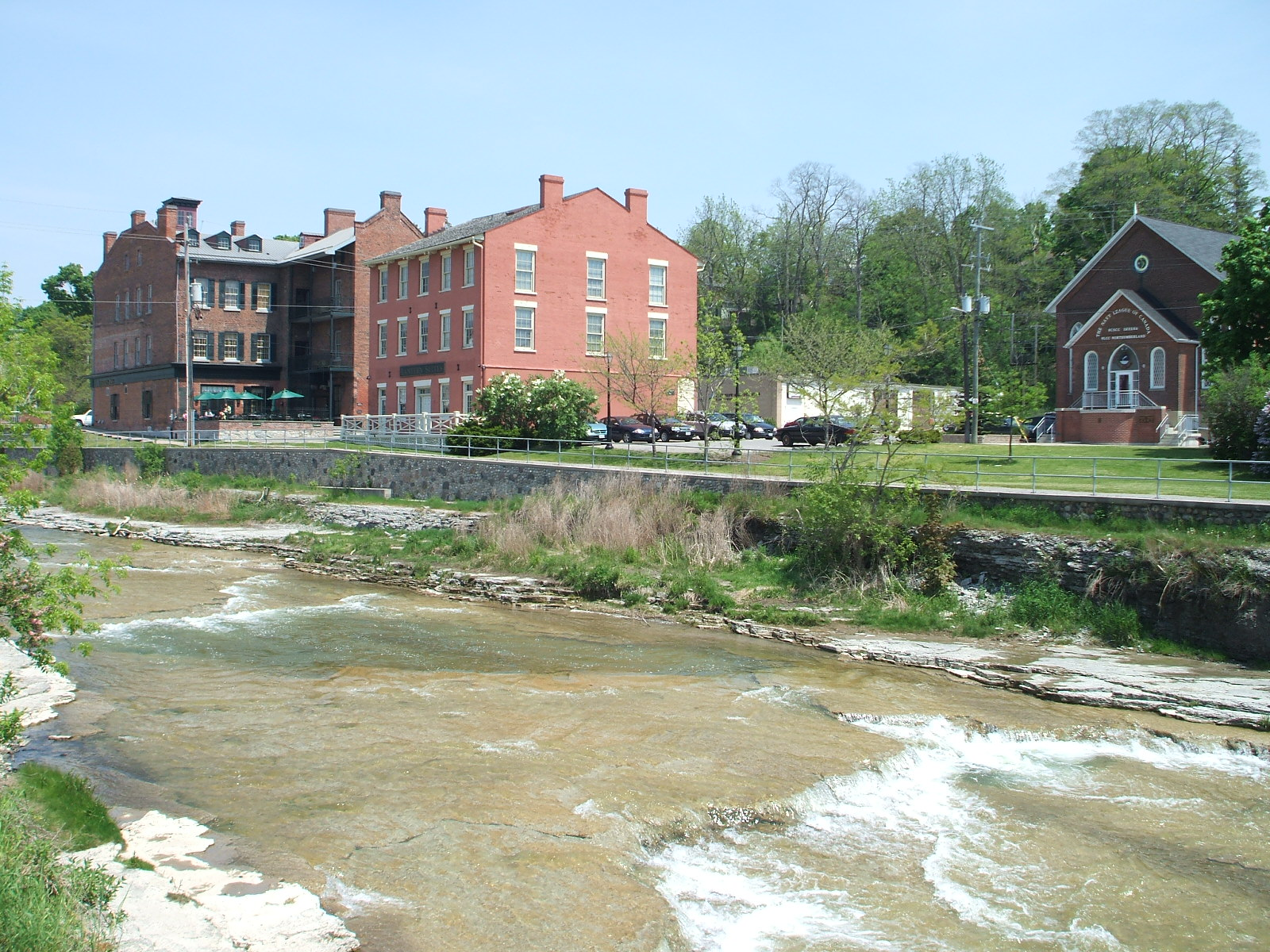 Ganaraska River, Port Hope, Ontario, Canada